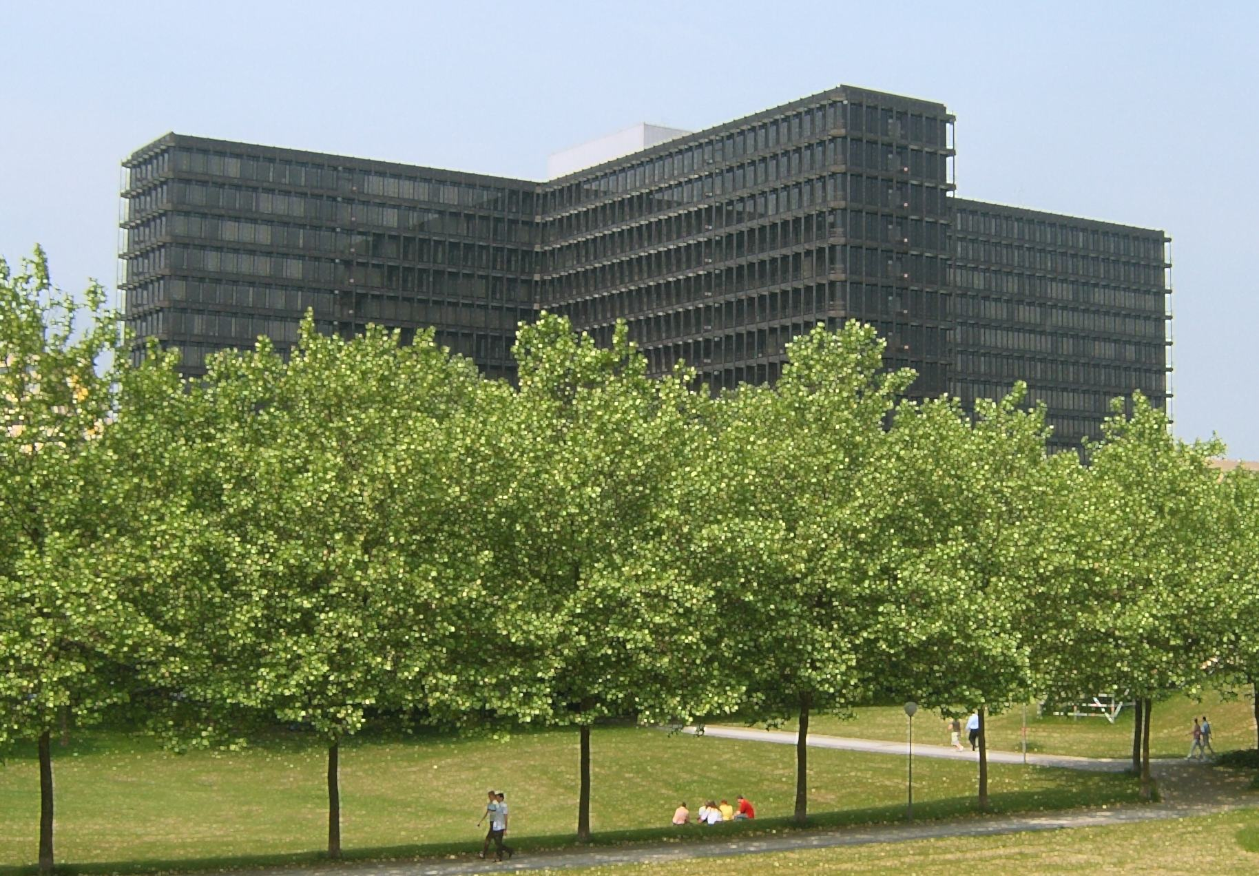 Ehemaliges Gebäude der Deutschen Shell (heute von ITERGO genutzt) in der City Nord in Winterhude.